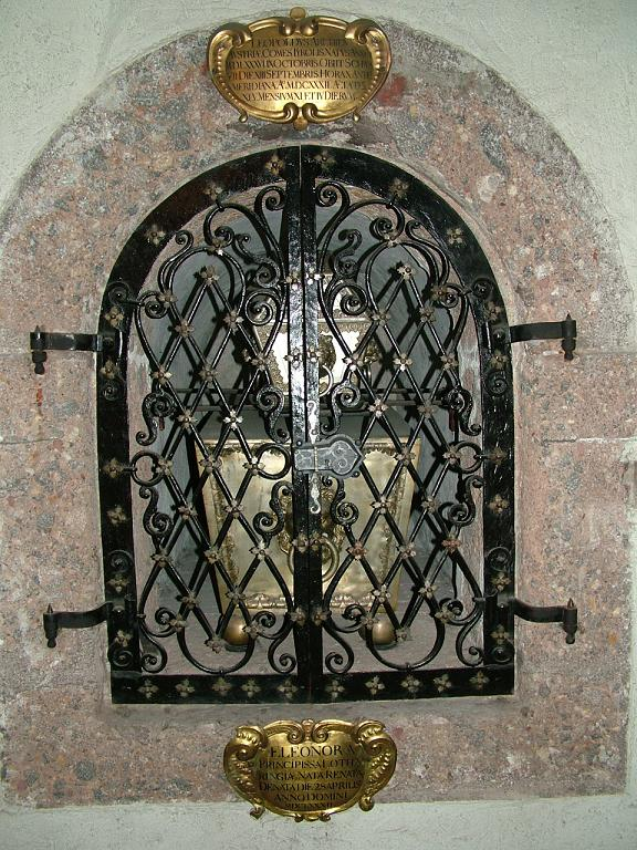 Grab Leopold V., Jesuitenkirche Innsbruck